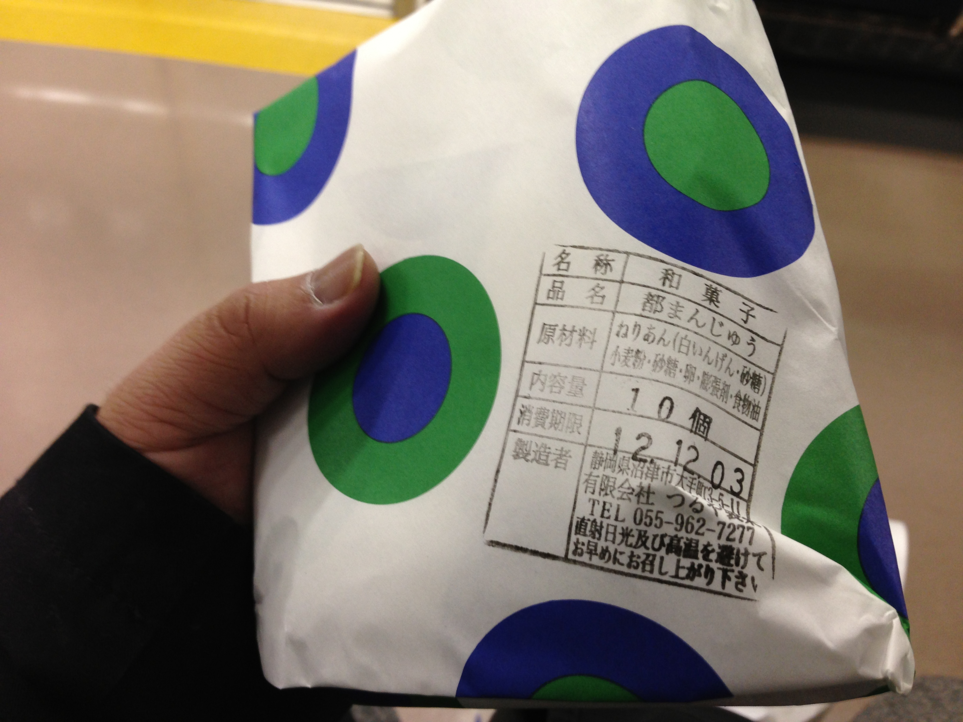 Wrap to Seibu Department Store Numazu Original Pan Cake